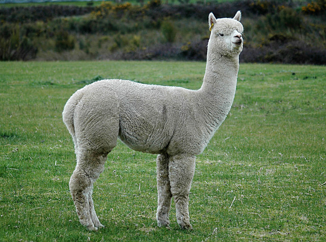 Alpakka